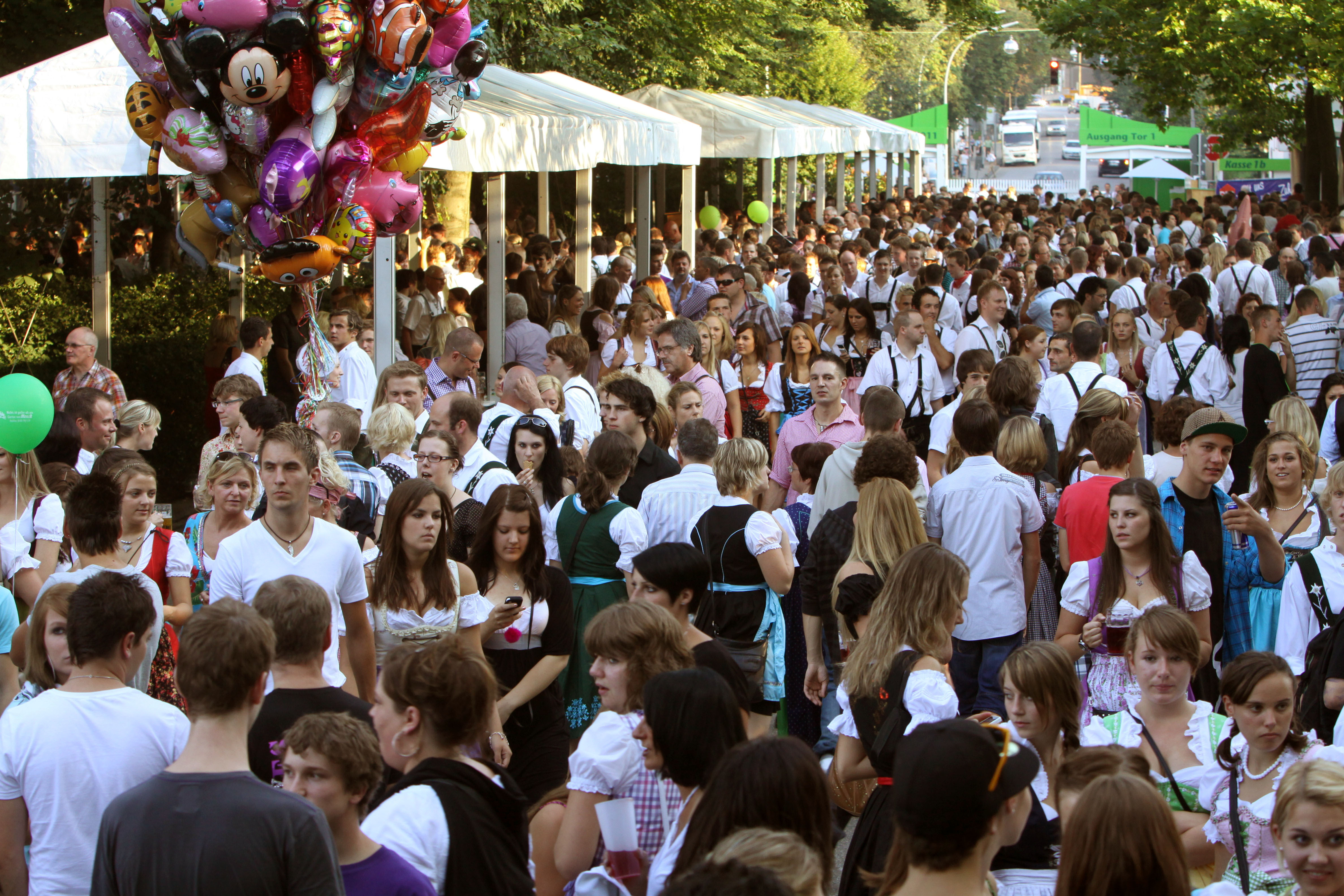 Allgäuer Festwoche Kempten